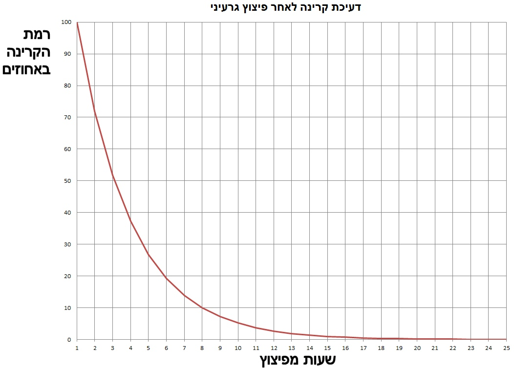 רמתץ הקרינה יורדת לעשירית כל שבע שעות. יש לשים לב שנקודת האפס אינה מועד הפיצוץ, אלא המועד בו הנשורת נחתה לקרקע - שעות לאחר הפיצוץ עצמו.